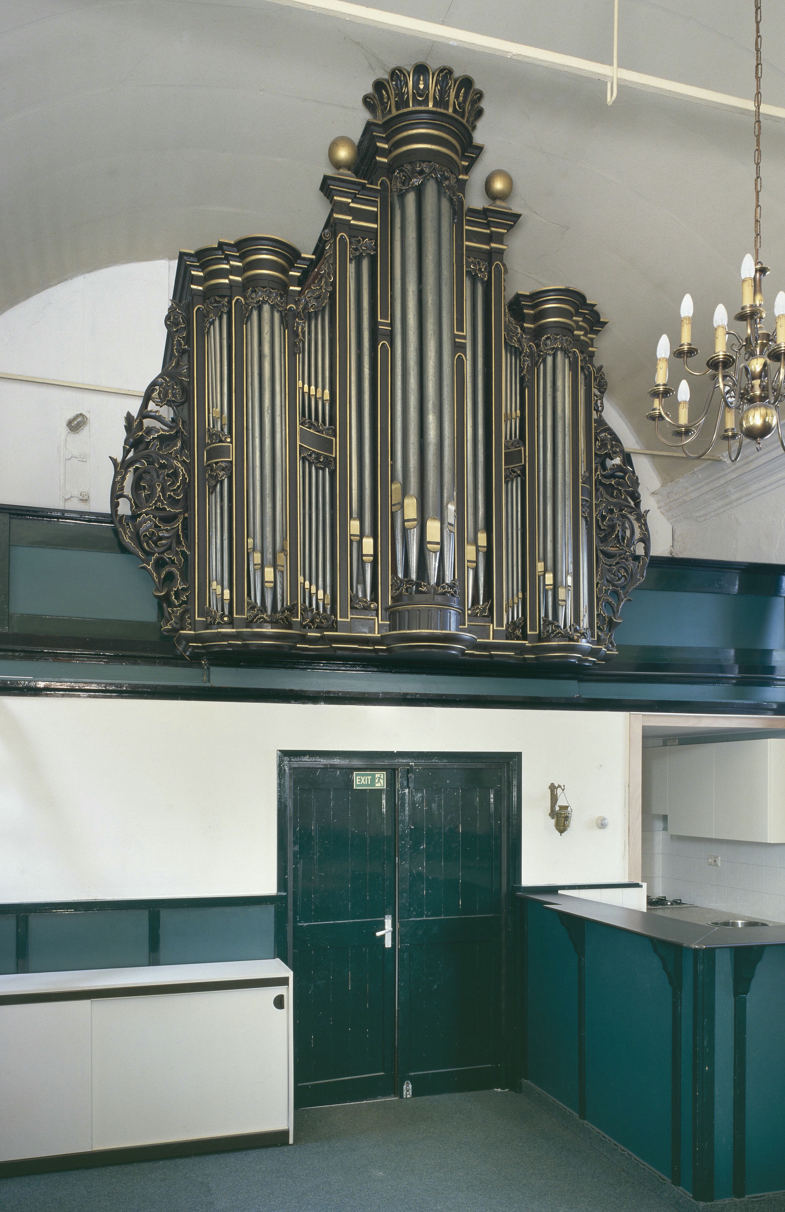 Voormalige Hervormde Kerk: Interieur, aanzicht orgel, orgelnummer (opmerking: Gefotografeerd voor Het Historische Orgel in Nederland 1894-1901, bladzijde 276)